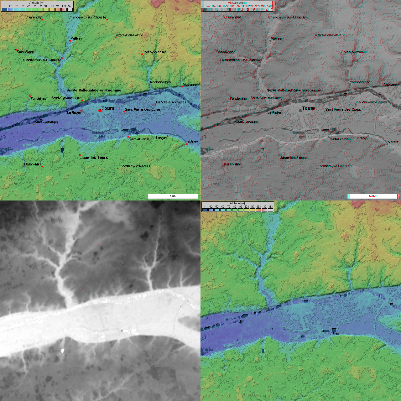 Topographie de Tours 4 images topographique (20 km de coté) de Tours prisent par la mission SRTM. Image topographique + position des villes image topographique en relief + position des villes image topographique en niveau de gris (utile pour displacement map dans les logiciel 3D) Image topographique sans les villes Générée par le logiciel Radiomobile à partir des données domaine public de la mission SRTM de la NASA.